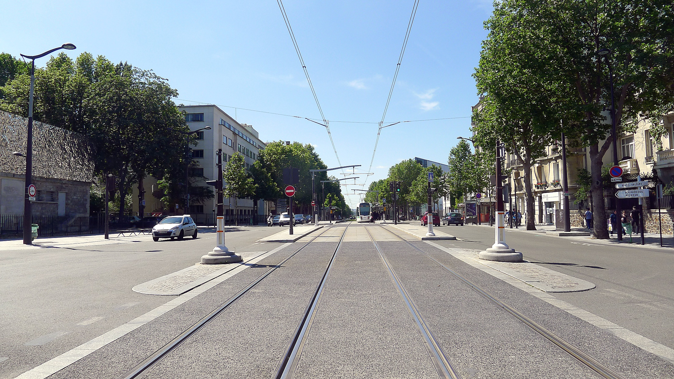 Boulevard Jourdan à la porte d'Arcueil - Paris XIV